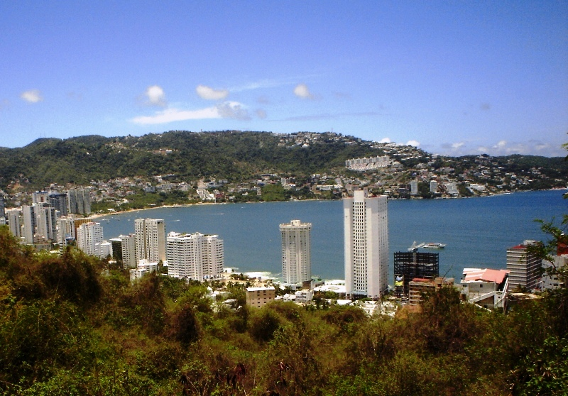 La Torre de Acapulco a la derecha del Hotel Calinda en Acapulco, Guerrero, México